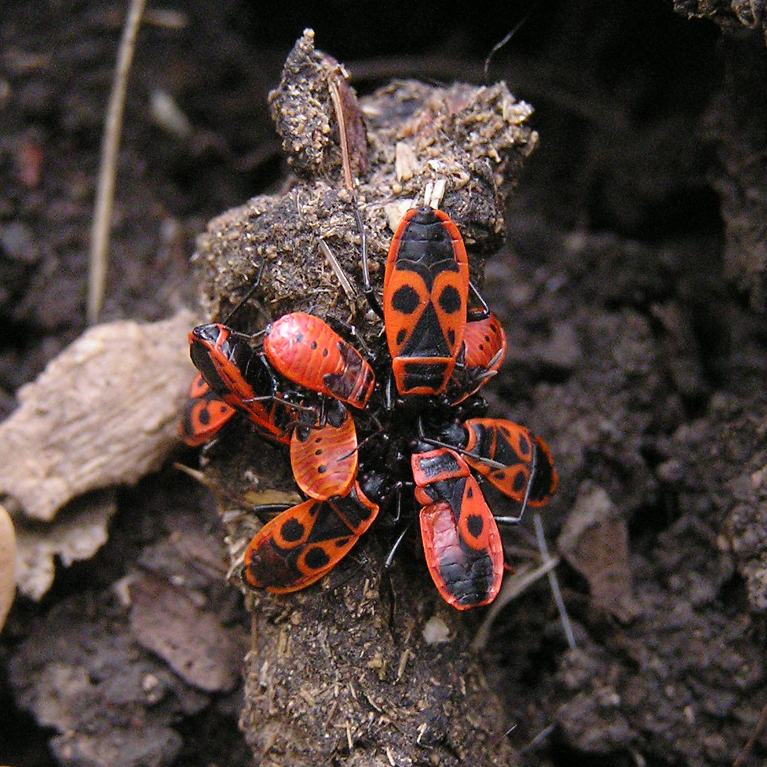 Общество клопов-солдатиков